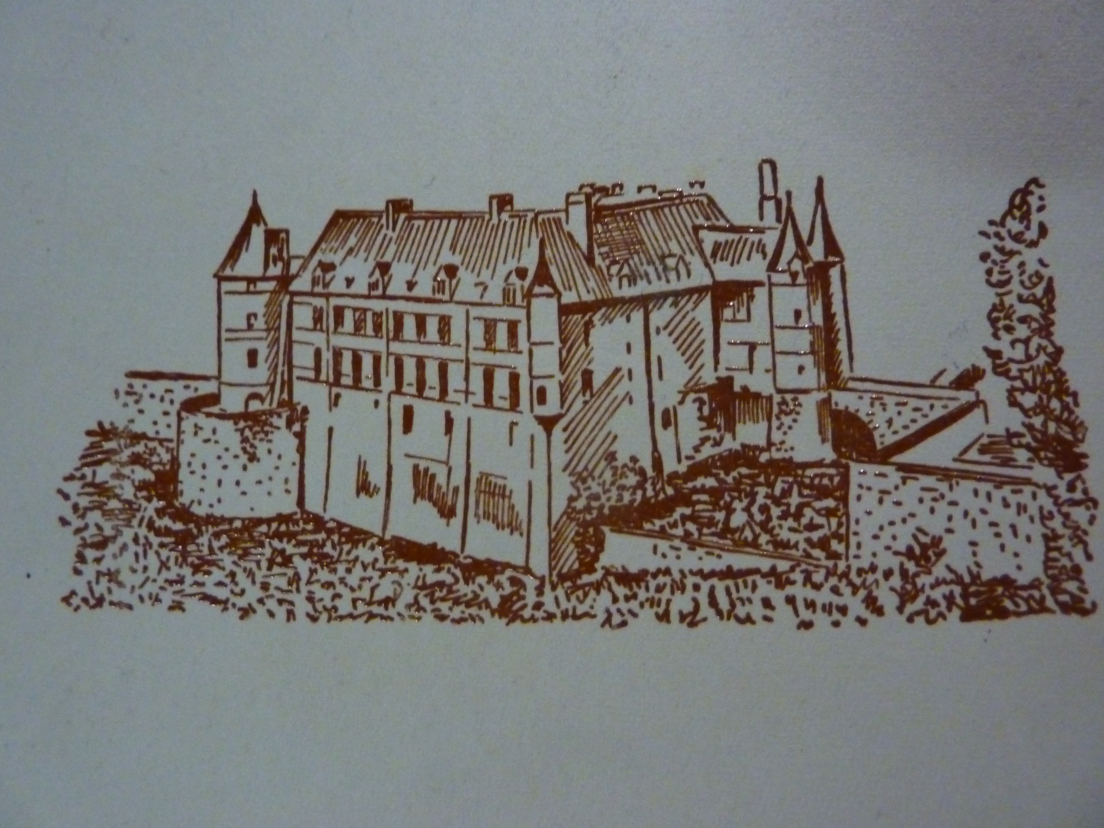 Sur un bloc de papier à lettres de la Maison de la Presse de Châteauneuf-sur-Cher dans les années 1960.